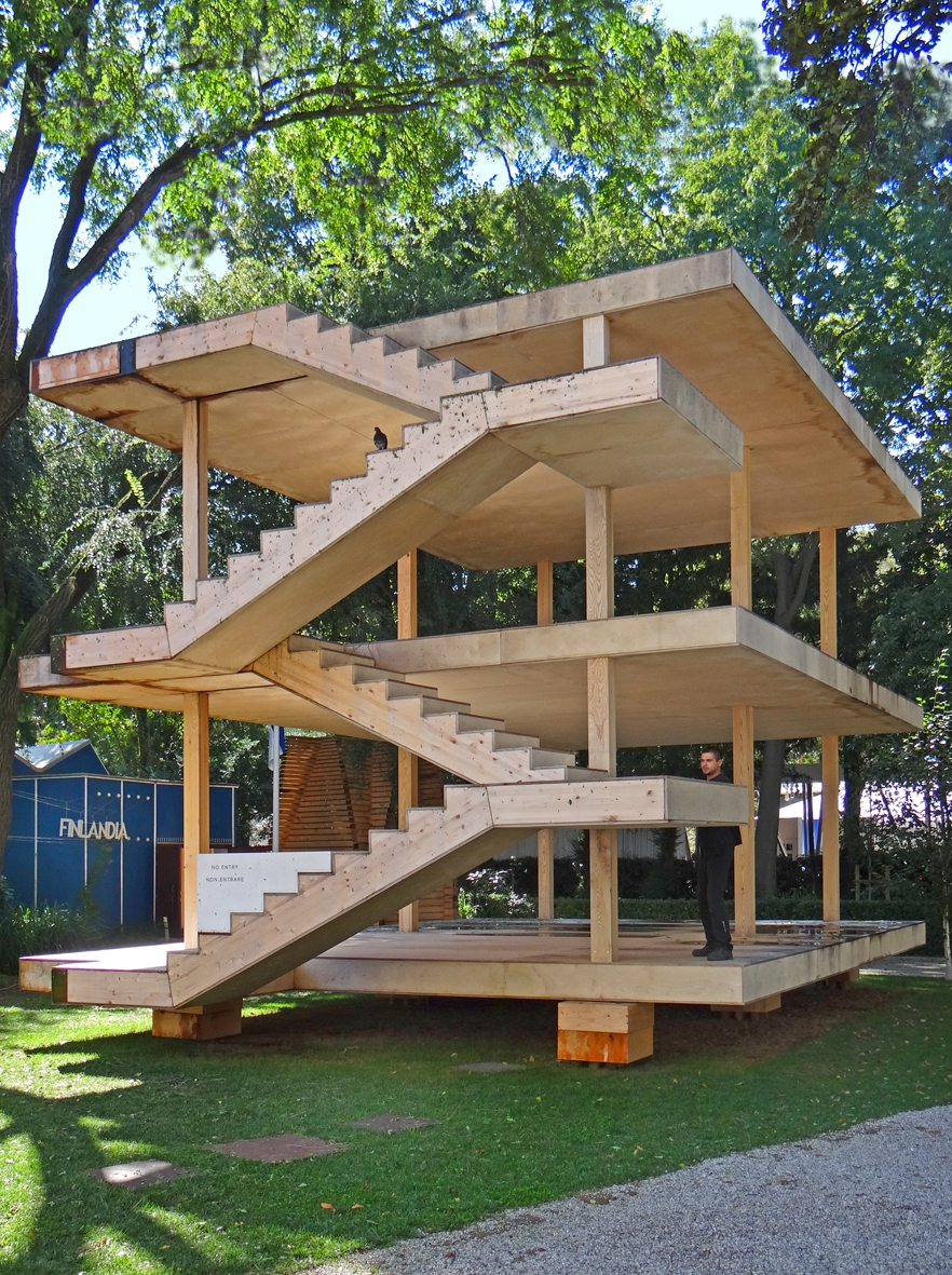 La maison Dom-ino dans les Giardini à Venise dessin original : Le Corbusier Reconstruction en bois : AA school of Architecture, London La maison Dom-ino a été conçue par Le Corbusier en 1914 dans le but de fournir des solutions simples pour reconstruire rapidement les maisons détruites par la guerre. Il s'agit d'un système de construction en béton, sans fondation, composé de poteaux portant des planchers et reposant sur de petits blocs. La trame permet de composer librement façades et plans. On connait le succès de cette solution architecturale en béton qui apparaît comme la graine du style international mais dont les usages détournés, pour ne pas payer les impôts, ont terriblement dégradé les villes et campagnes de nombreux pays du sud. A ce sujet, la biennale d'architecture présente à l'Arsenal une version inattendue d'une maison de type Dom-ino construite en Sicile dans laquelle, l'escalier a été placé à l'intérieur afin de passer pour une citerne sur une vue aérienne et de ne pas payer les taxes liées à une maison d'habitation (les contrôleurs des impôts ne se déplaçaient pas sur le terrain pour vérifier ! ). Site de la fondation Le Corbusier